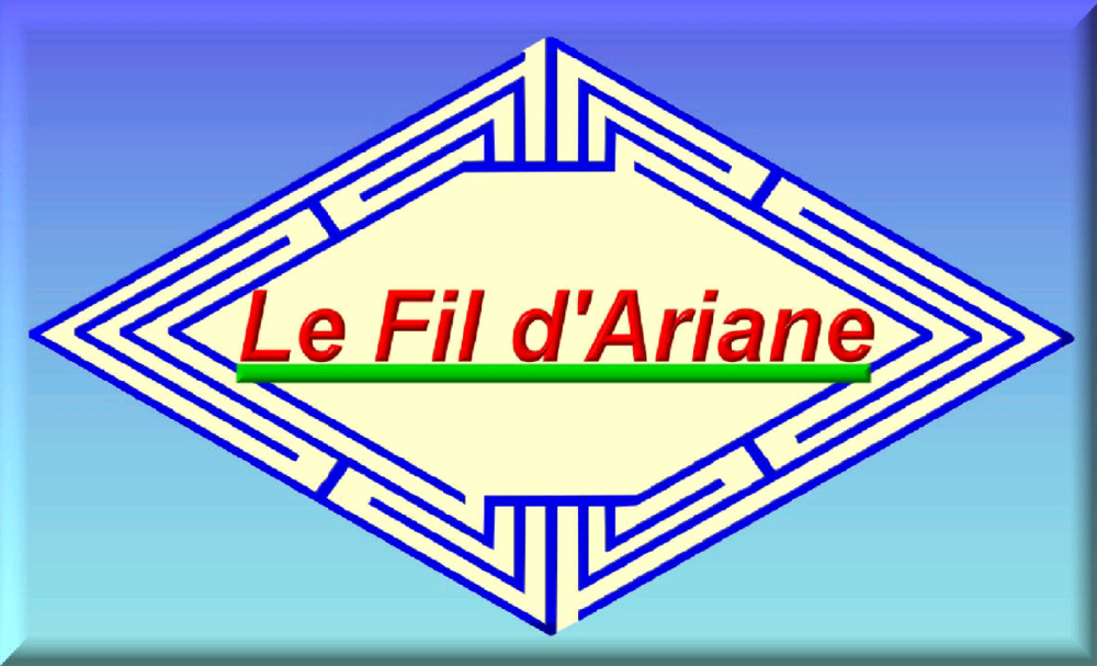 Logo de l'association d'entraide généalogique Le Fil d'Ariane